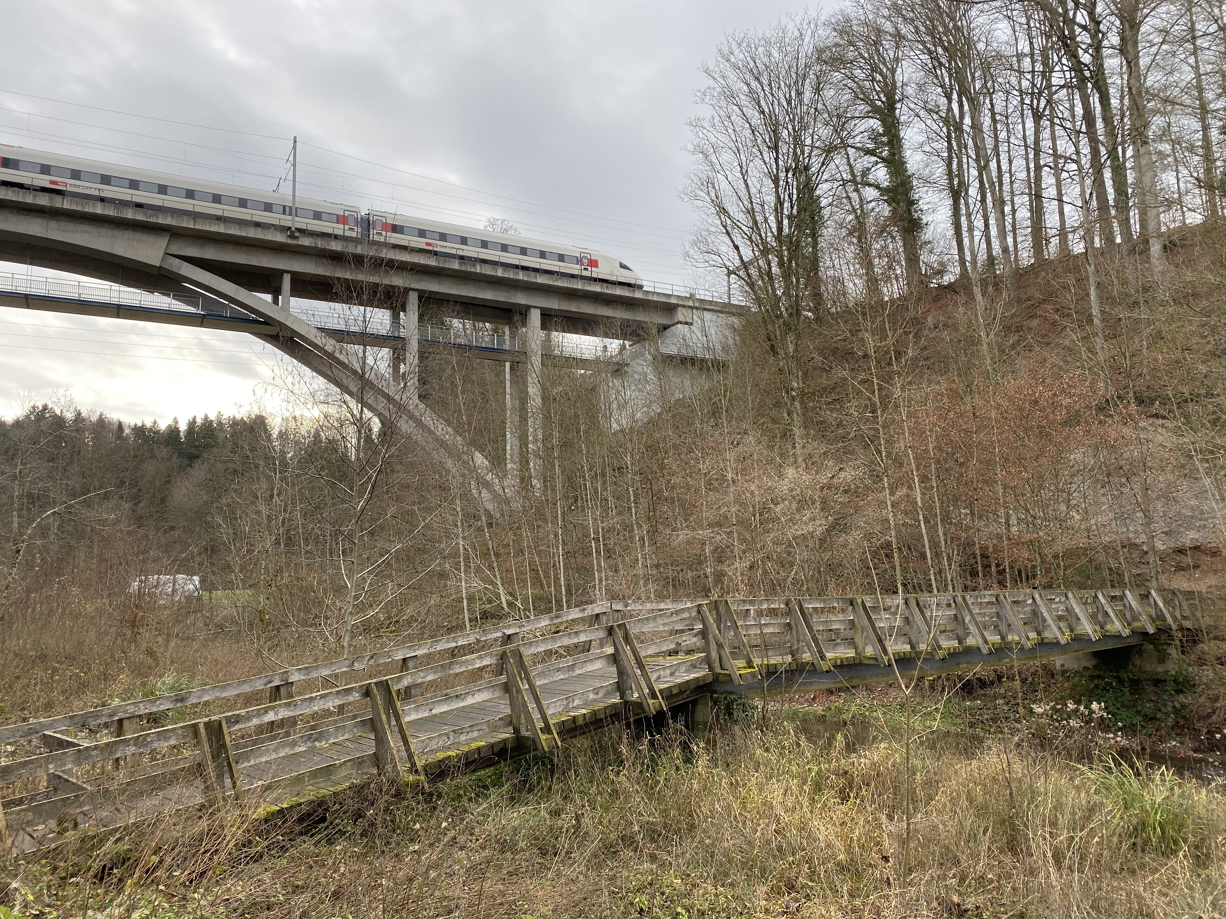 Glattbrücke der SBB und Militärsteg über die Glatt zwischen Flawil und Gossau SG, bei Espel / Isenhammer, SBB RABDe 500 (ICN) darüberfahrend